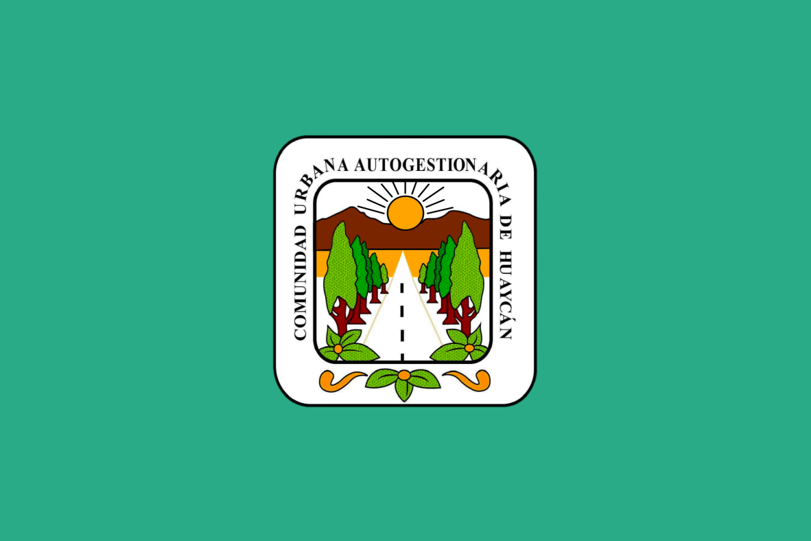 Bandera color verde jungla y su escudo en centro.